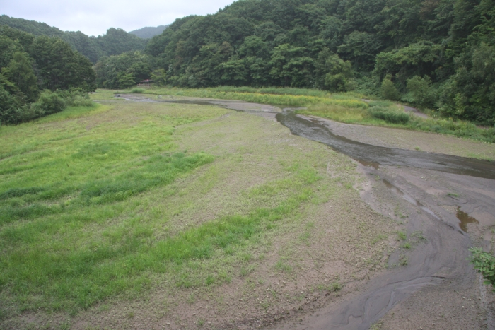 看々橋から望む看看川